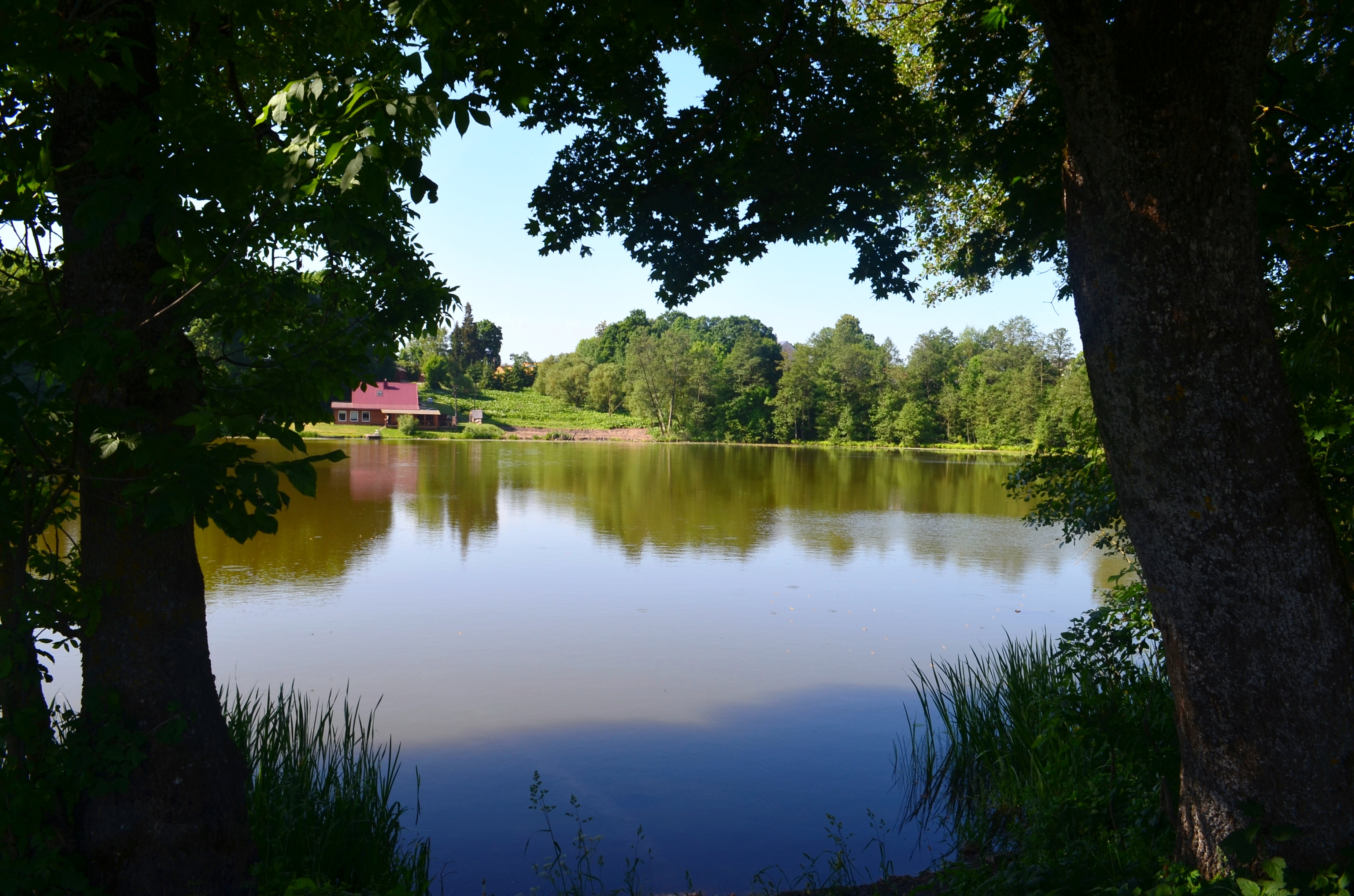 Sužionių ežeras, Vilniaus raj.